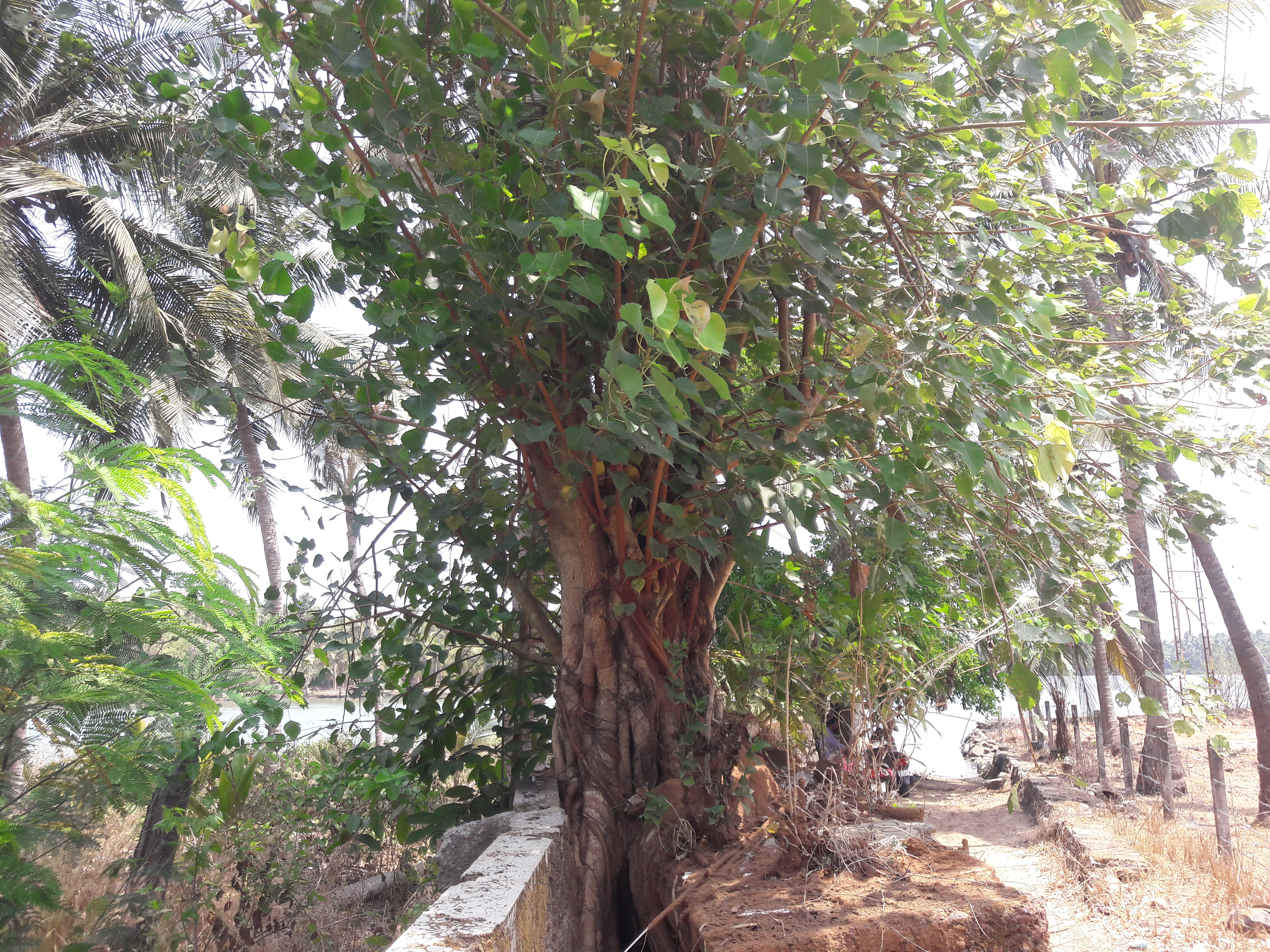 പുഴവക്കത്തെ ഒരു കല്ലിന്‍റെ വിടവില്‍ വളരുന്ന അരയാല്‍. Peepal tree ശാസ്ത്രീയ നാമം Ficus religiosa കുടുംബം Moraceae.